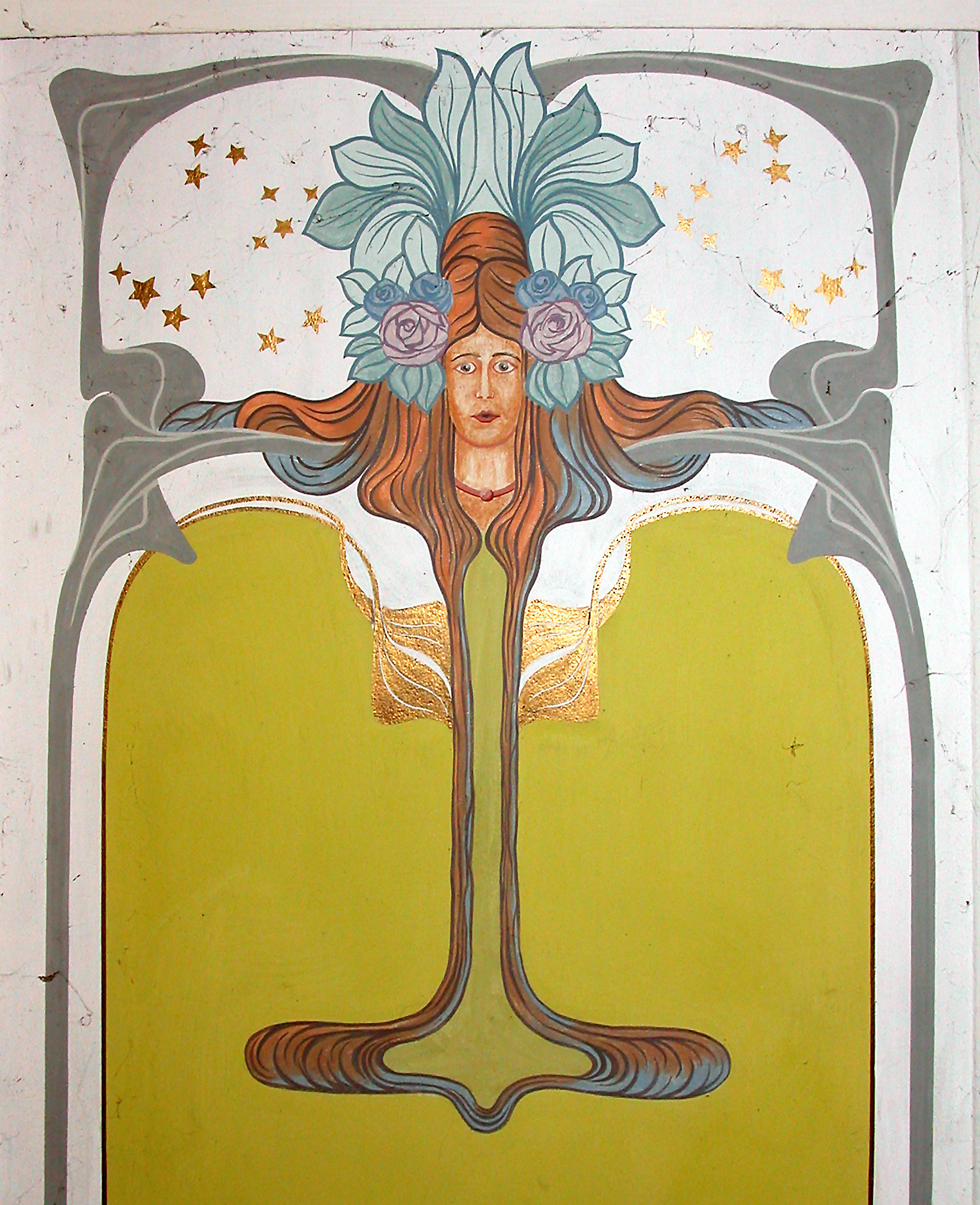 13.05.2005 01307 Dresden-Johannstadt: Bundschuhstraße 7 (GMP: 51.056752,13.762666). Jugendstilmalerei am Deckenspiegel des Treppenhauses. [DSCN6601.TIF]20050513012DR.JPG(c)Blobelt